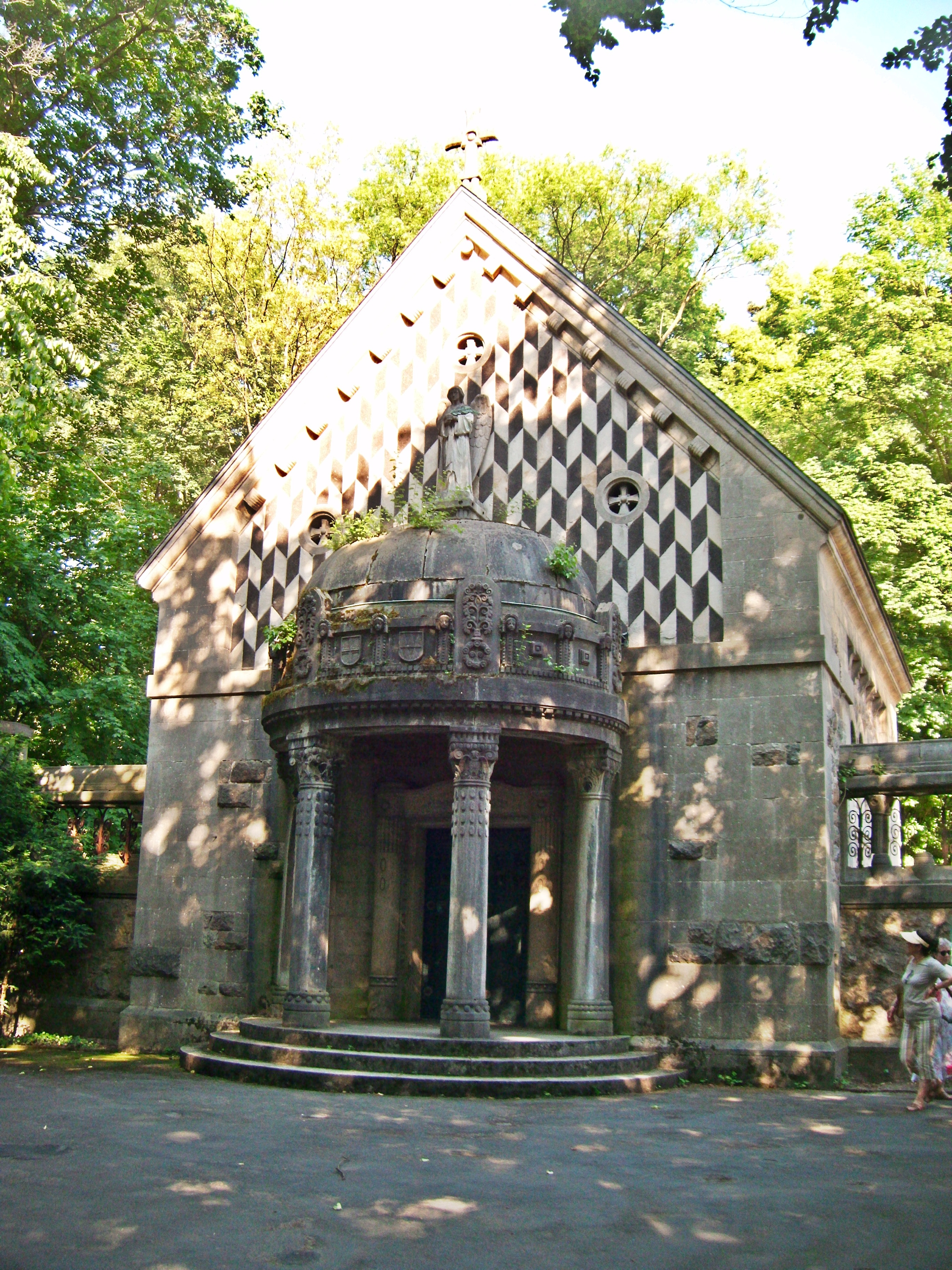 Schlosspark Weinheim (Baden-Württemberg), Mausoleum der Grafen von Berckheim, erbaut von Ludwig Becker, 1910